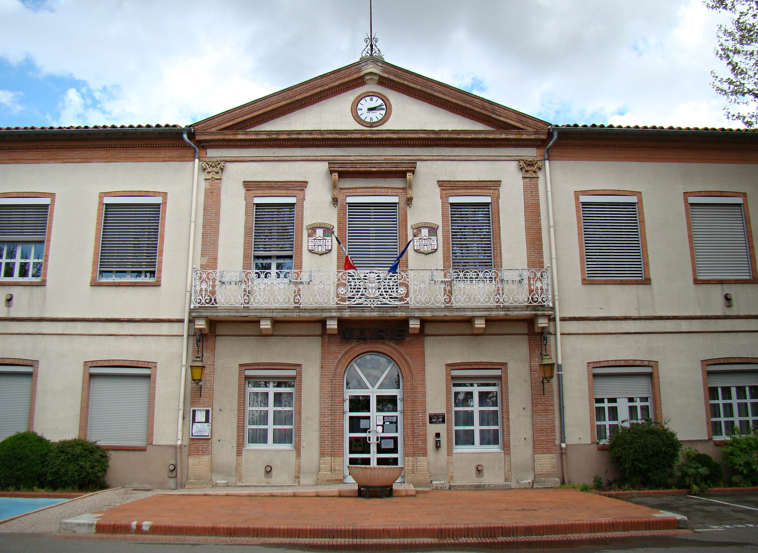 Façade de la mairie d'Aucamville, commune de la Haute-Garonne